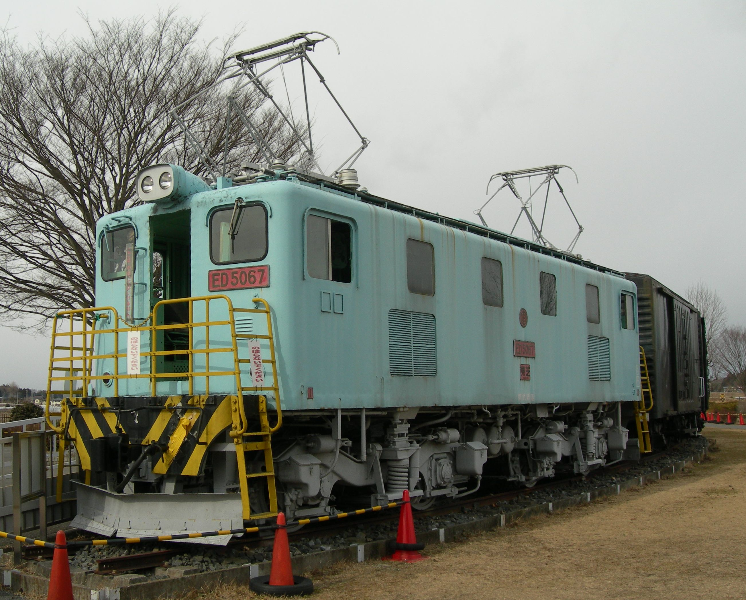 Ja:東武ED5060形電気機関車